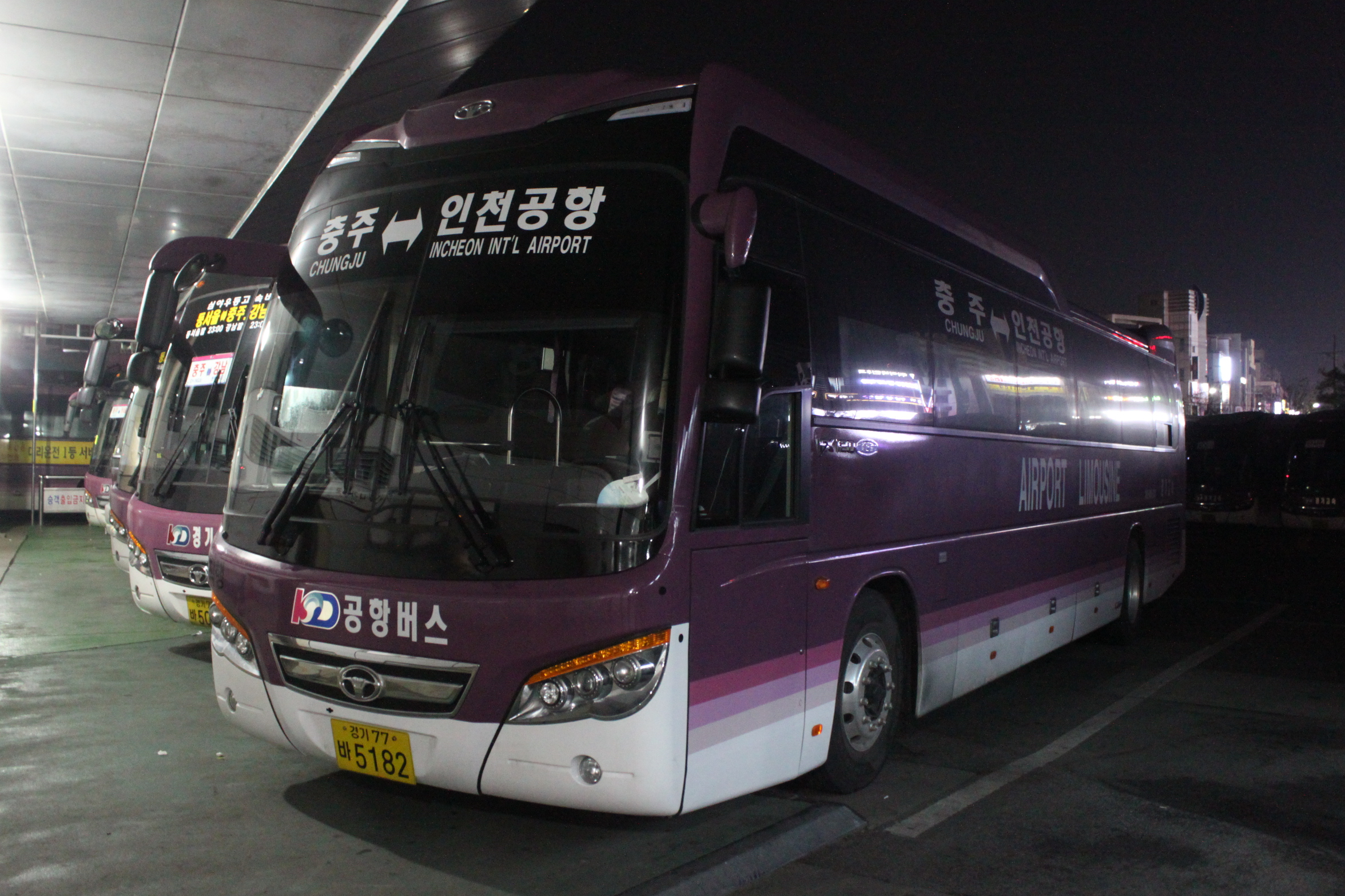 경기고속 소속 FX120 에이스